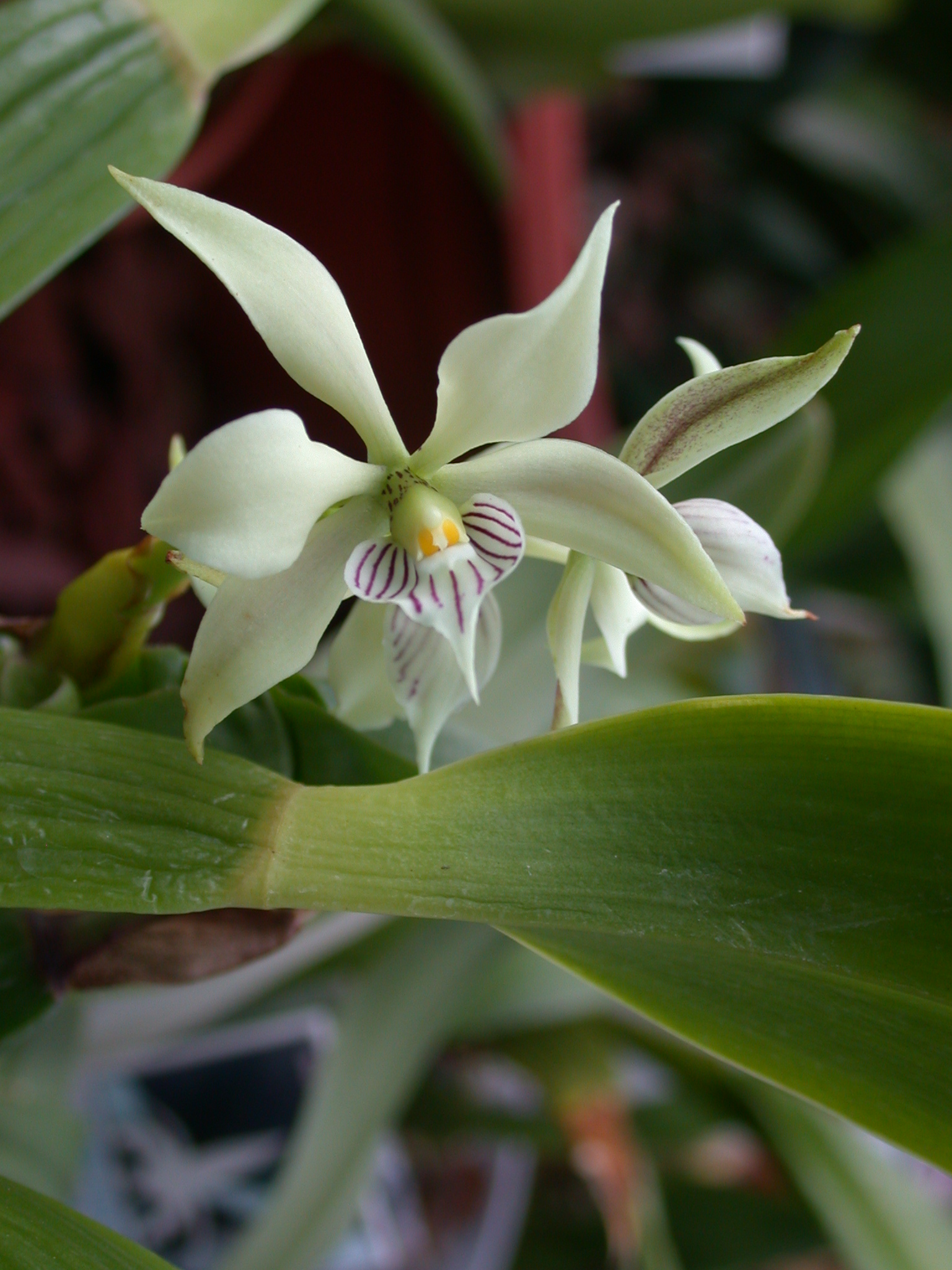 Epidendrum fragrans